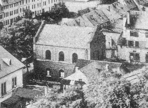 Ausschnitt aus einer Ansichtskarte mit der Synagoge in Diez; die Postkarte wurde 1905 abgeschickt